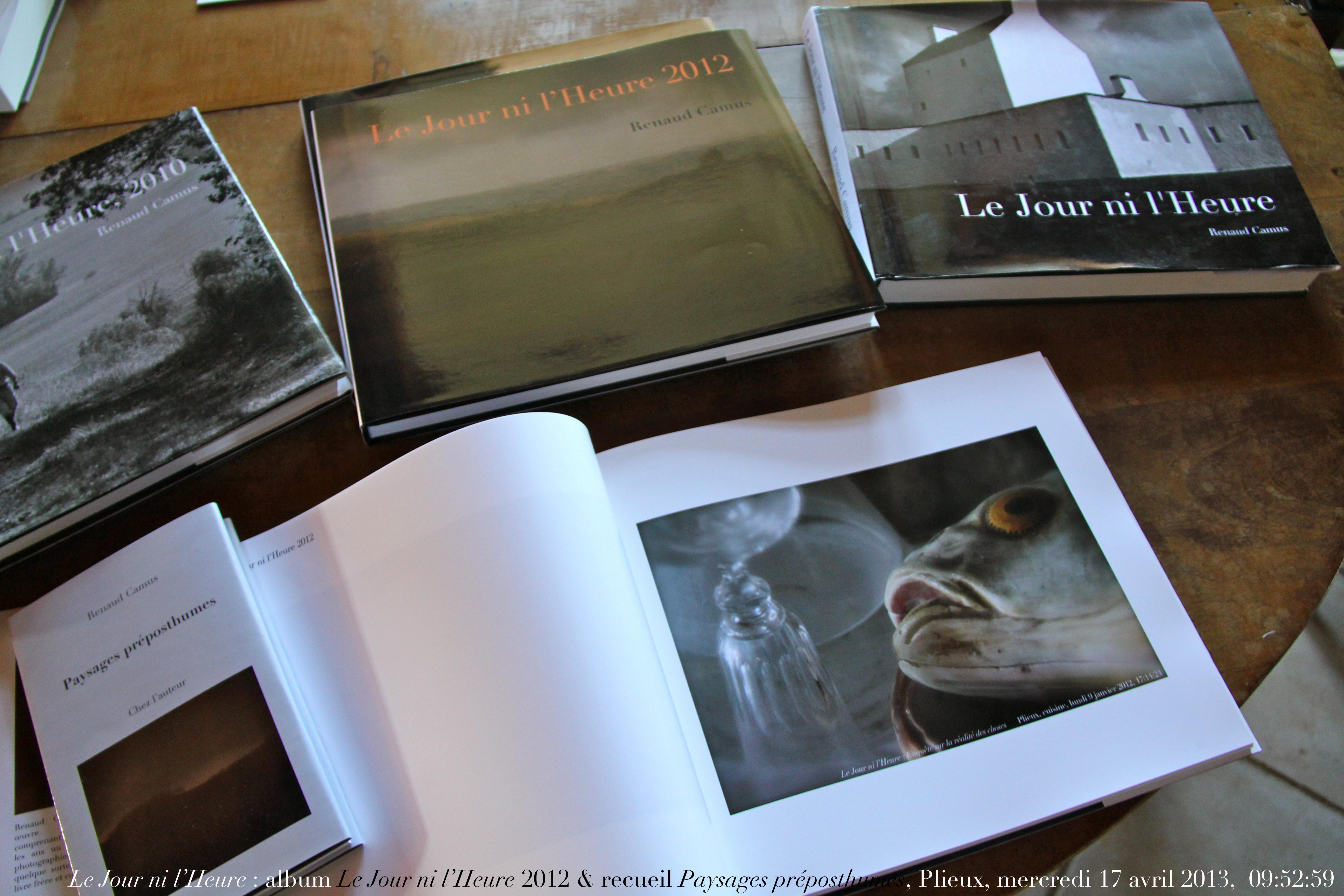 Renaud Camus, album Le Jour ni l’Heure 2012 & recueil Paysages préposthumes.